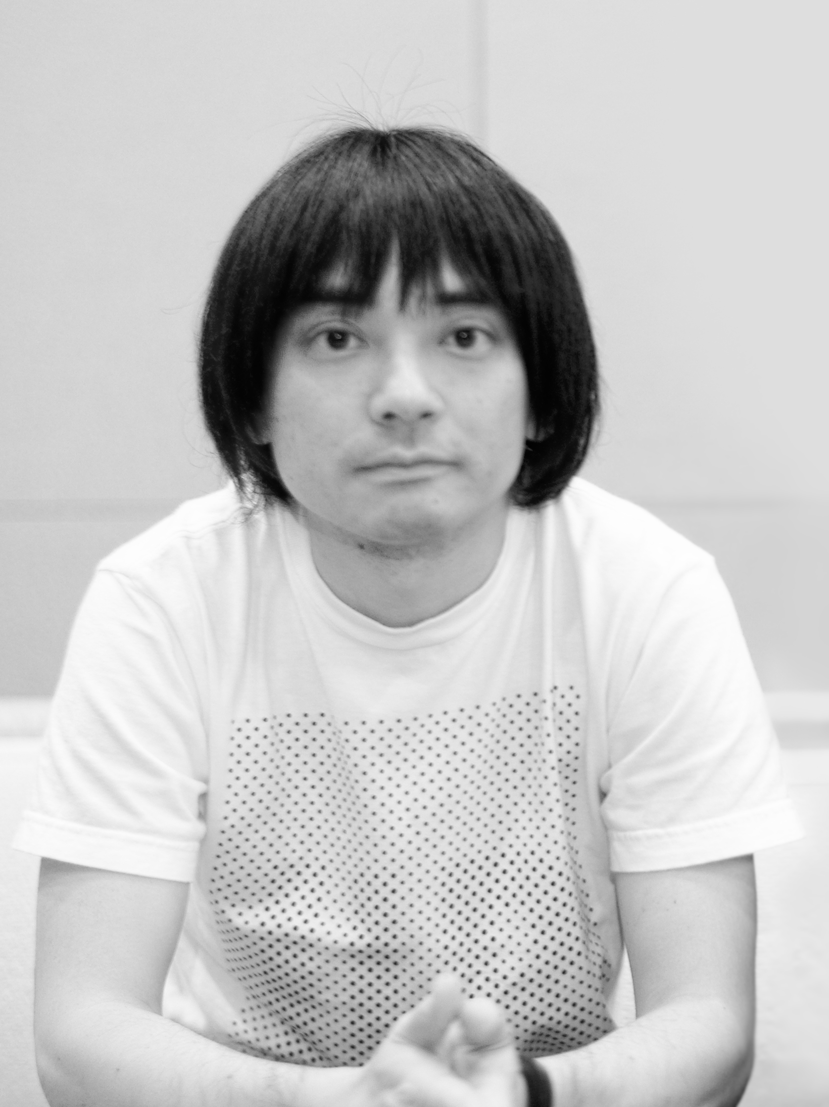 Keigo Oyamada and Ryuichi Sakamoto